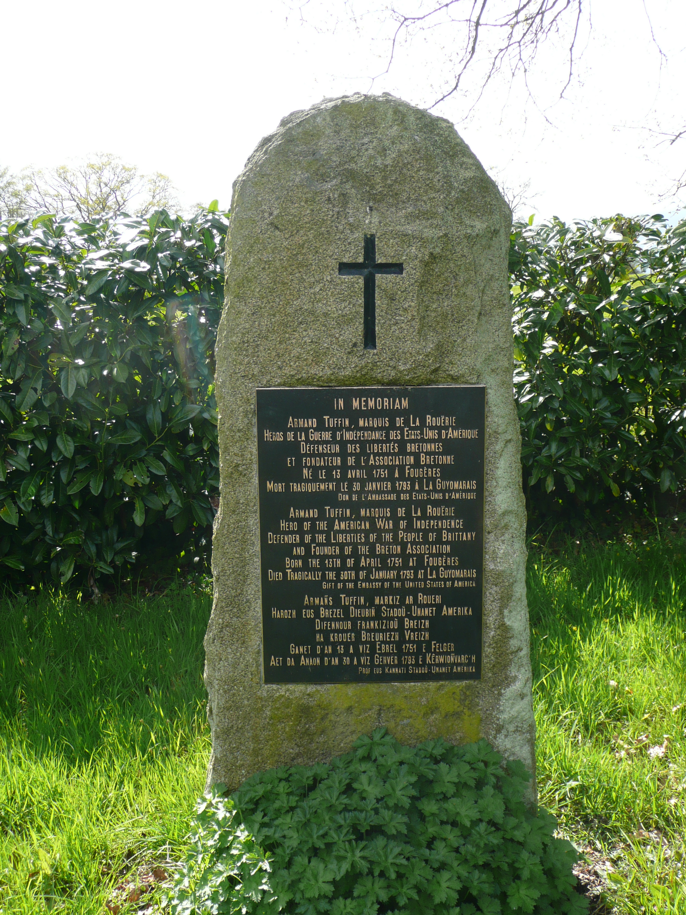 Mémorial du marquis de la Rouërie situé devant le château de La Guyomarais sur l'actuelle commune de Saint-Denoual (22)